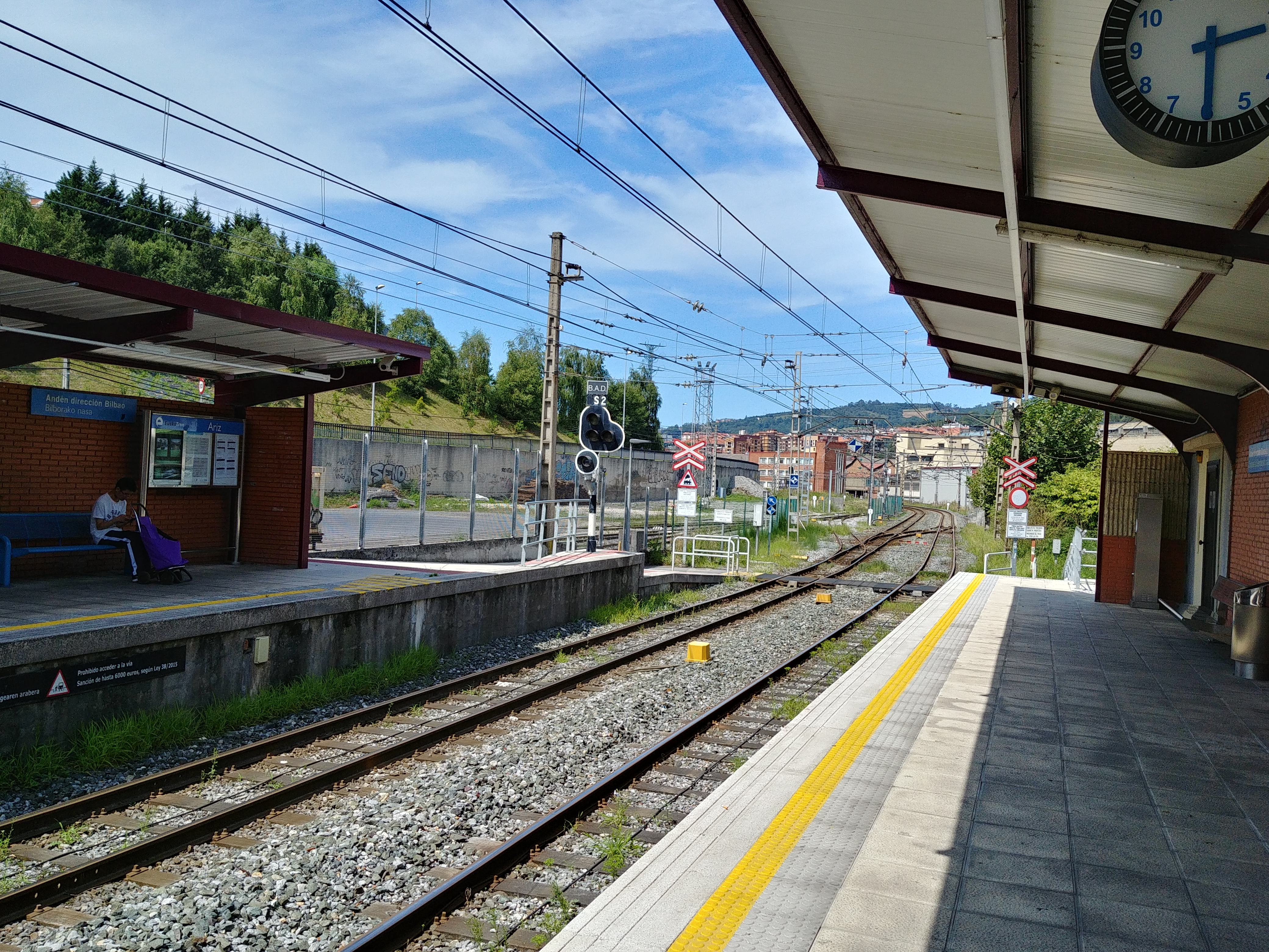 Punto de conexión del ferrocarril de Bilbao a San Sebastián con el ramal a la estación de Azbarren (extinta)